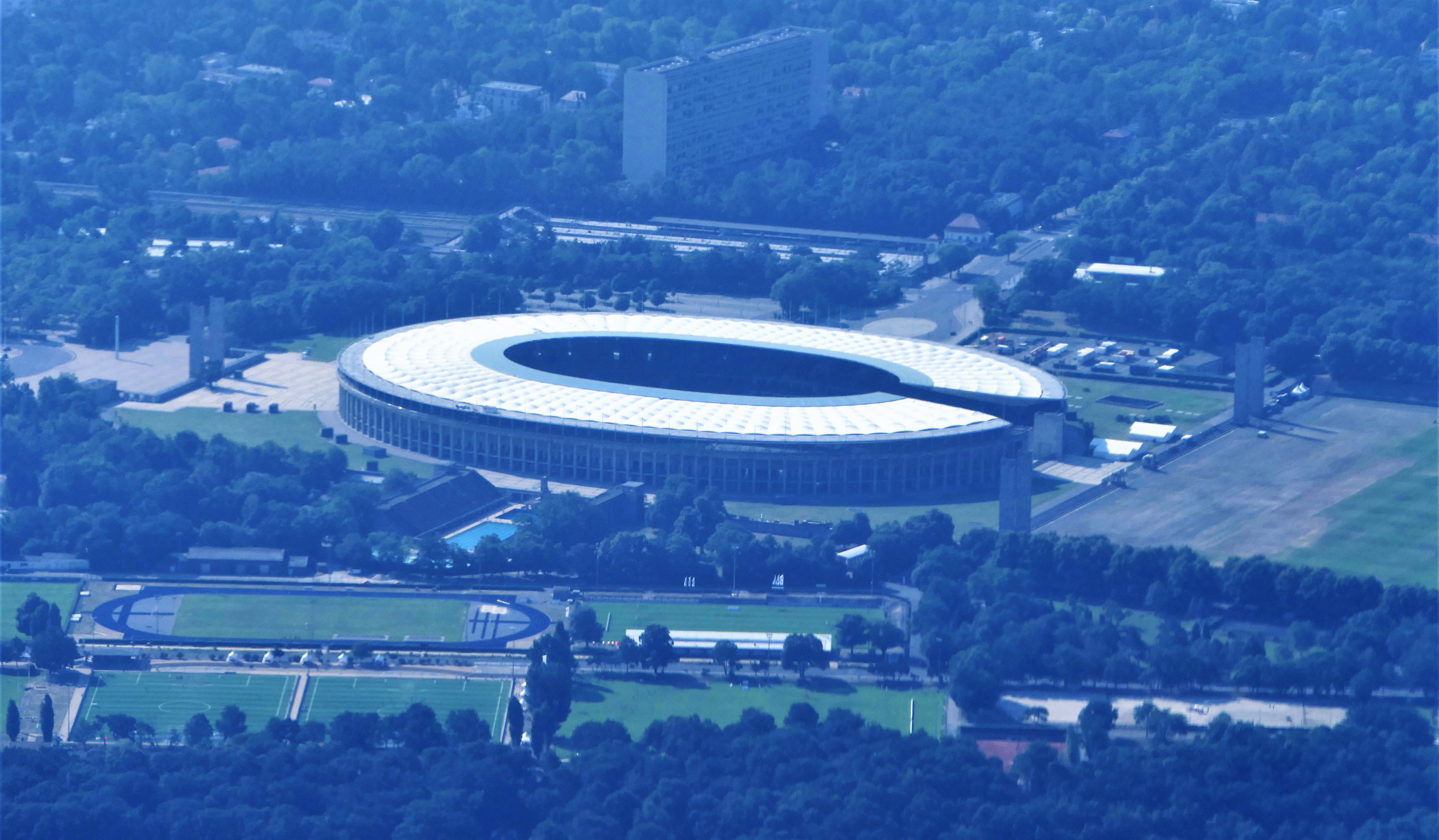 Olympiapark Berlin 2018 aus der Vogelperspektive